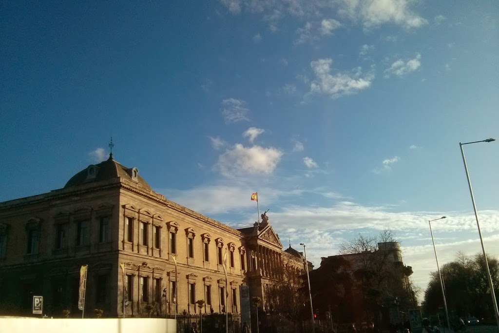 Biblioteca Nacional de España en Madrid